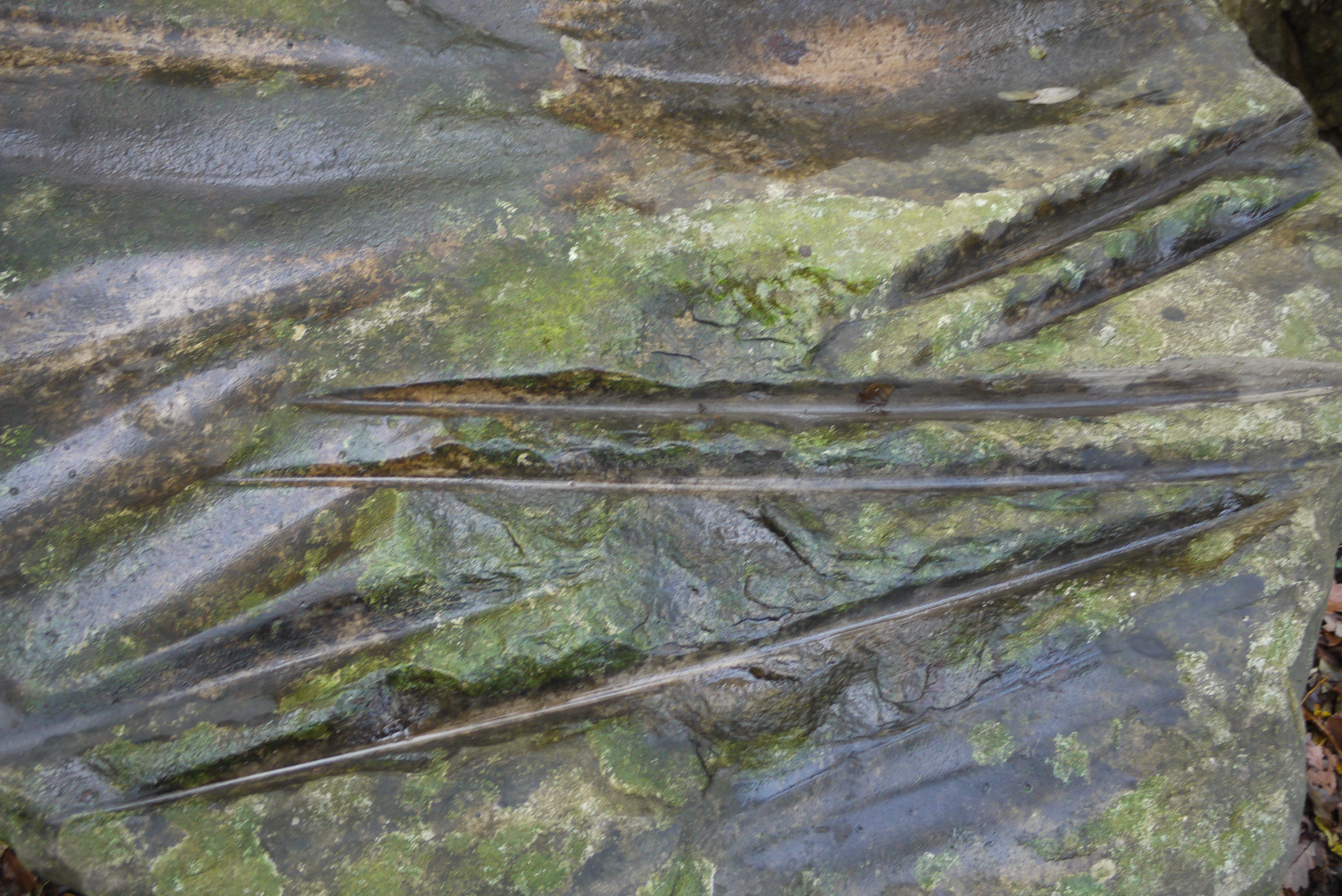 Le polissoir de Mezy-Moulins